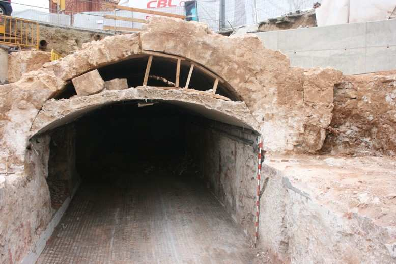 Vista del pont del Rec Comtal, localitzat a la intervenció arqueològica a l'Arc de Triomf, de l'any 2009